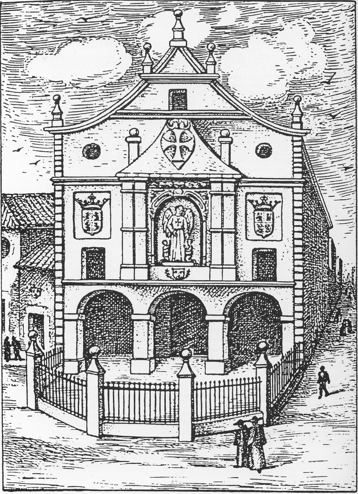 Convento de Nuestra Señora de la Buenanueva de los trinitarios descalzos, sobre cuyo solar se levantó el teatro del Liceo.